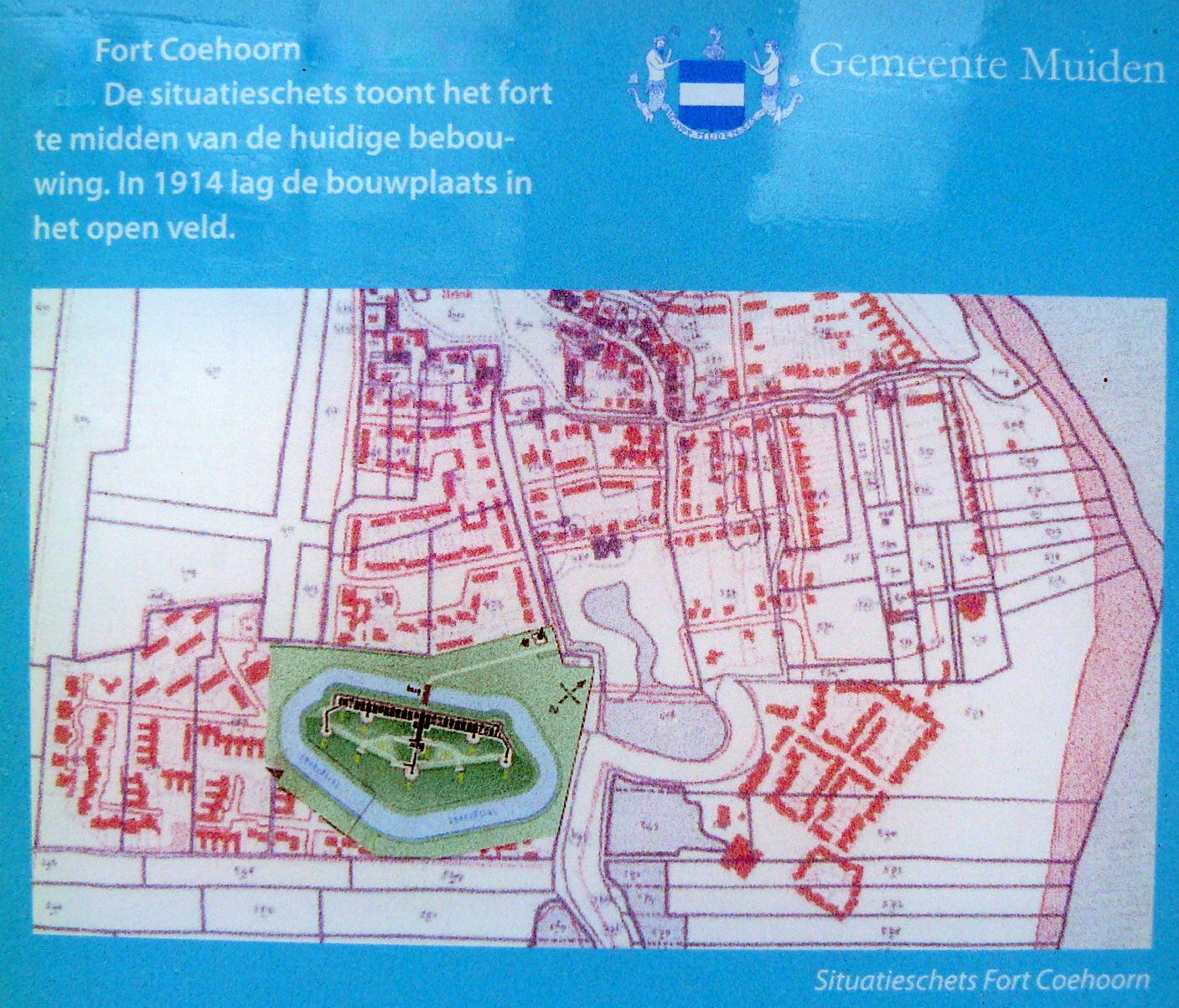 Tegenover de fortwachterswoning ligt een park met dit informatiebord over het Fort bij Muiderberg of Fort Coehoorn. Het groene deel geeft de locatie van het fort aan. Nu ligt op het voormalige fortterrein een woonwijk. De zwarte stip in de rechterbovenhoek van het fortterrein geeft de plaats aan van de fortwachterswoning.